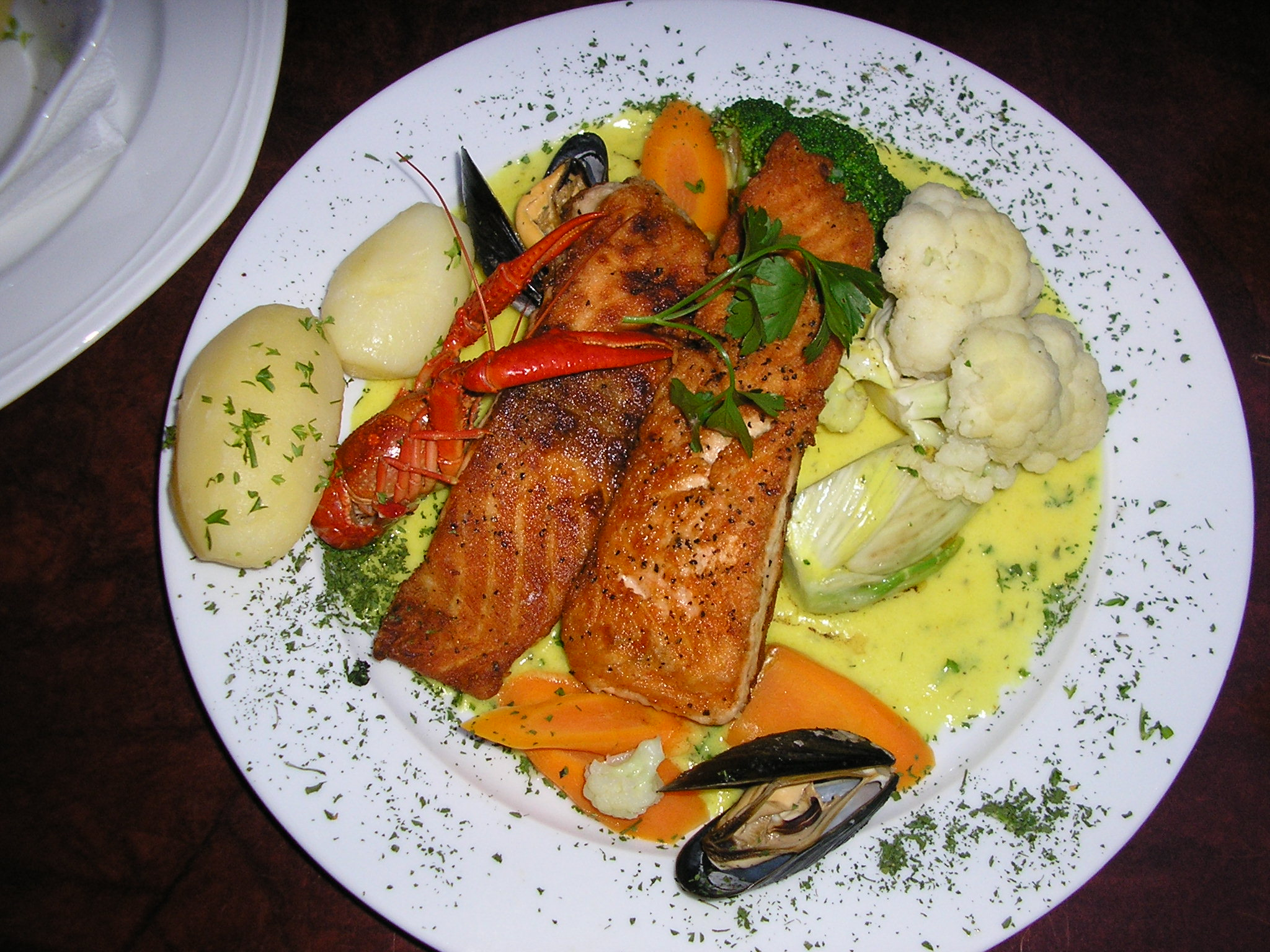 Sjømattallerken, blant annet med grillet laks.